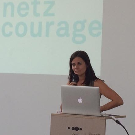 Jolanda Spiess-Hegglin #NetzCourage